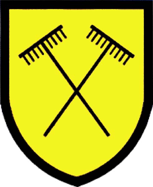 Znak obce Krupá (okres Kolín)